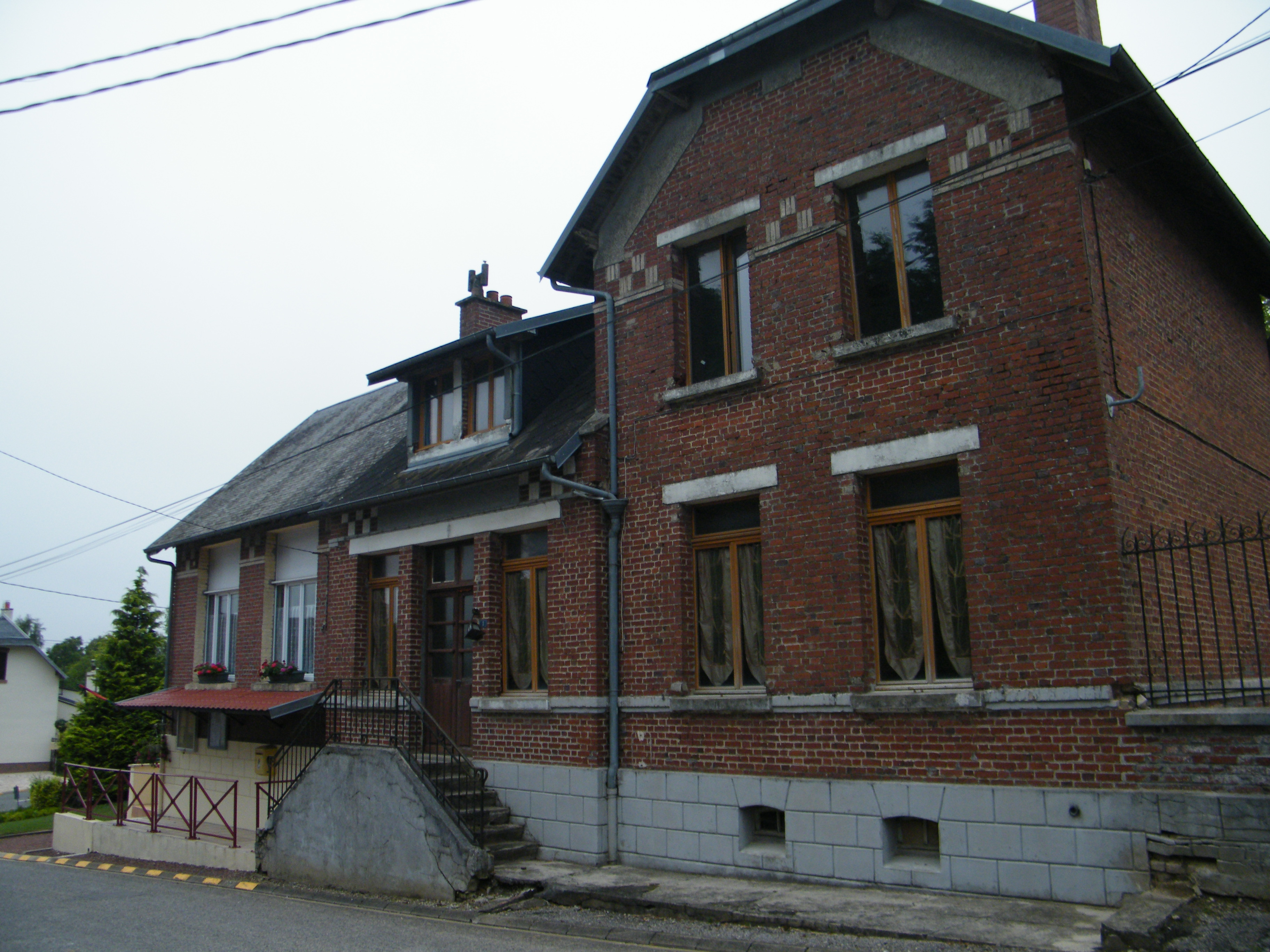 Mairie.